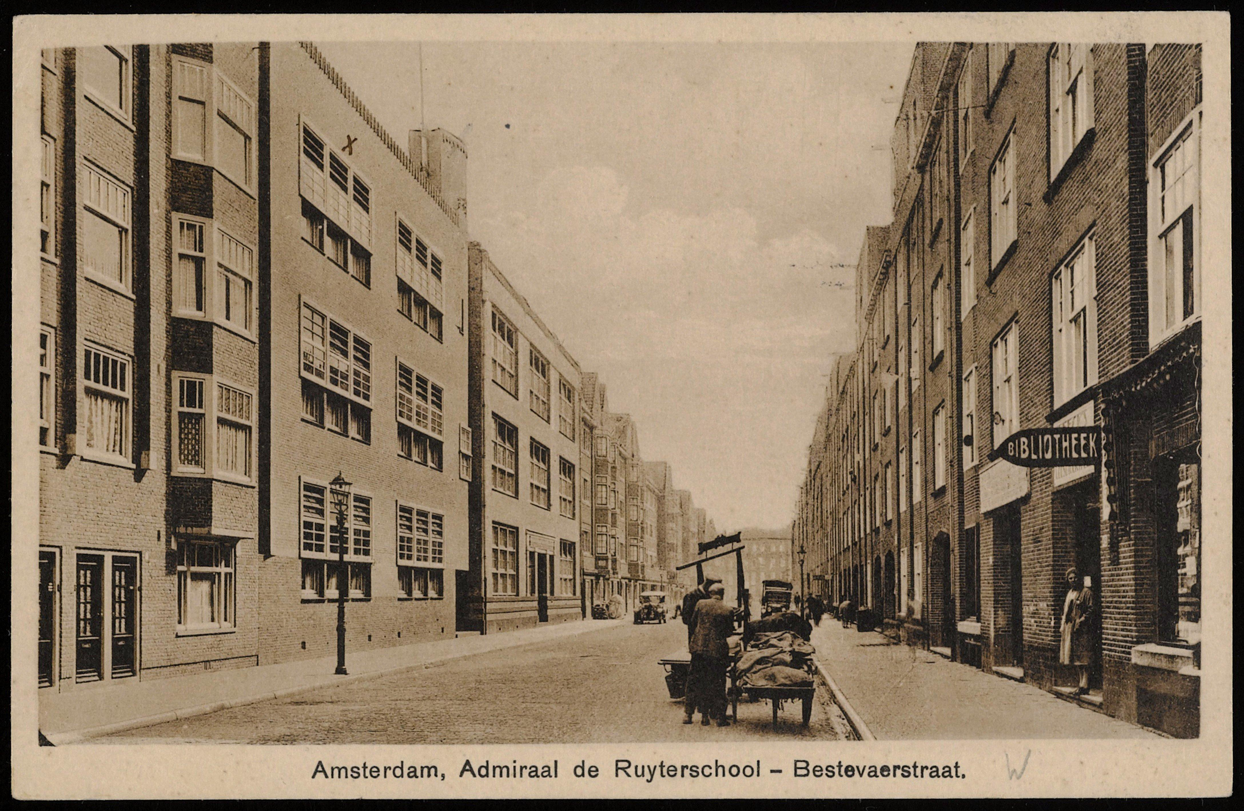 De Bestevaerstraat, gezien van de kant van de Jan van Galenstraat naar de Maarten Harpertsz Trompstraat. Links de Admiraal de Ruijterschool, rechts op nummer 49 uitgeverij en boekhandel Heeck. Rond 1920